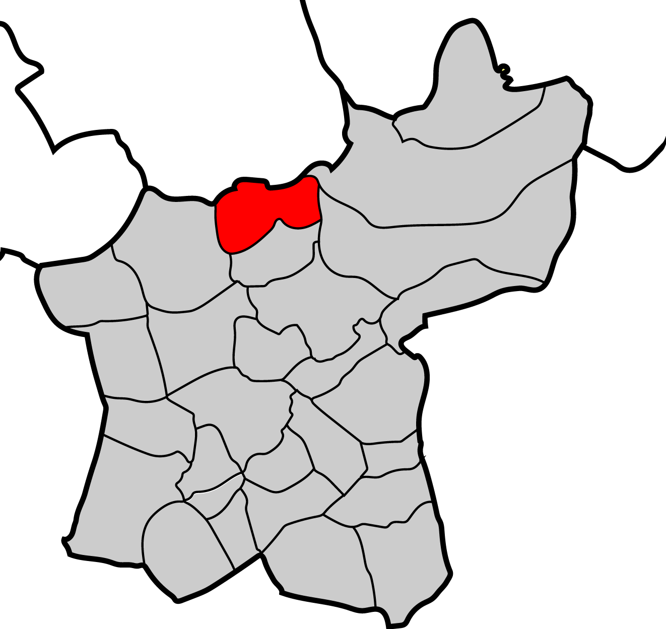 Mapa parroquia de Guimarei Baralla